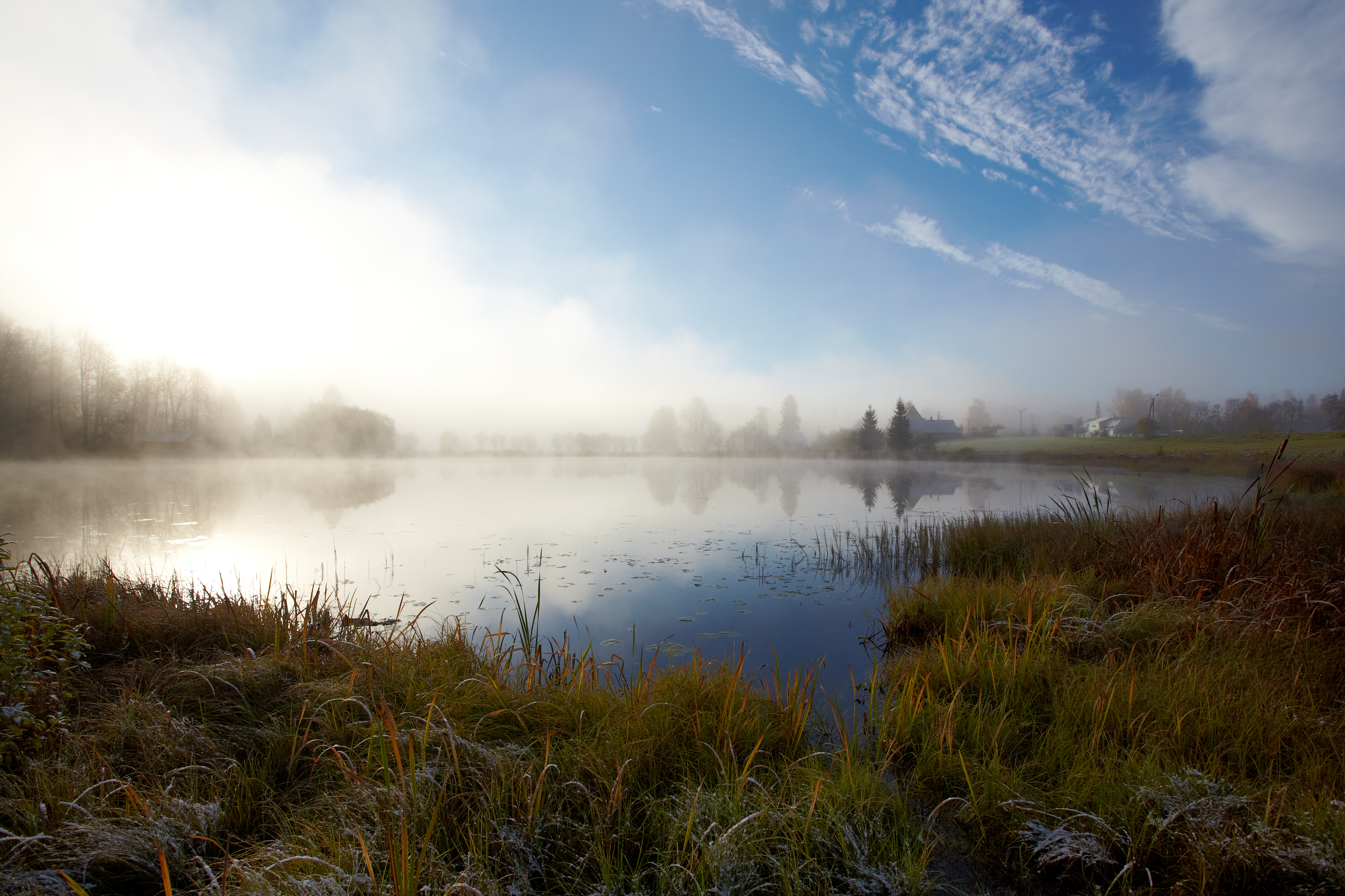 Rõuge Kaussjärv